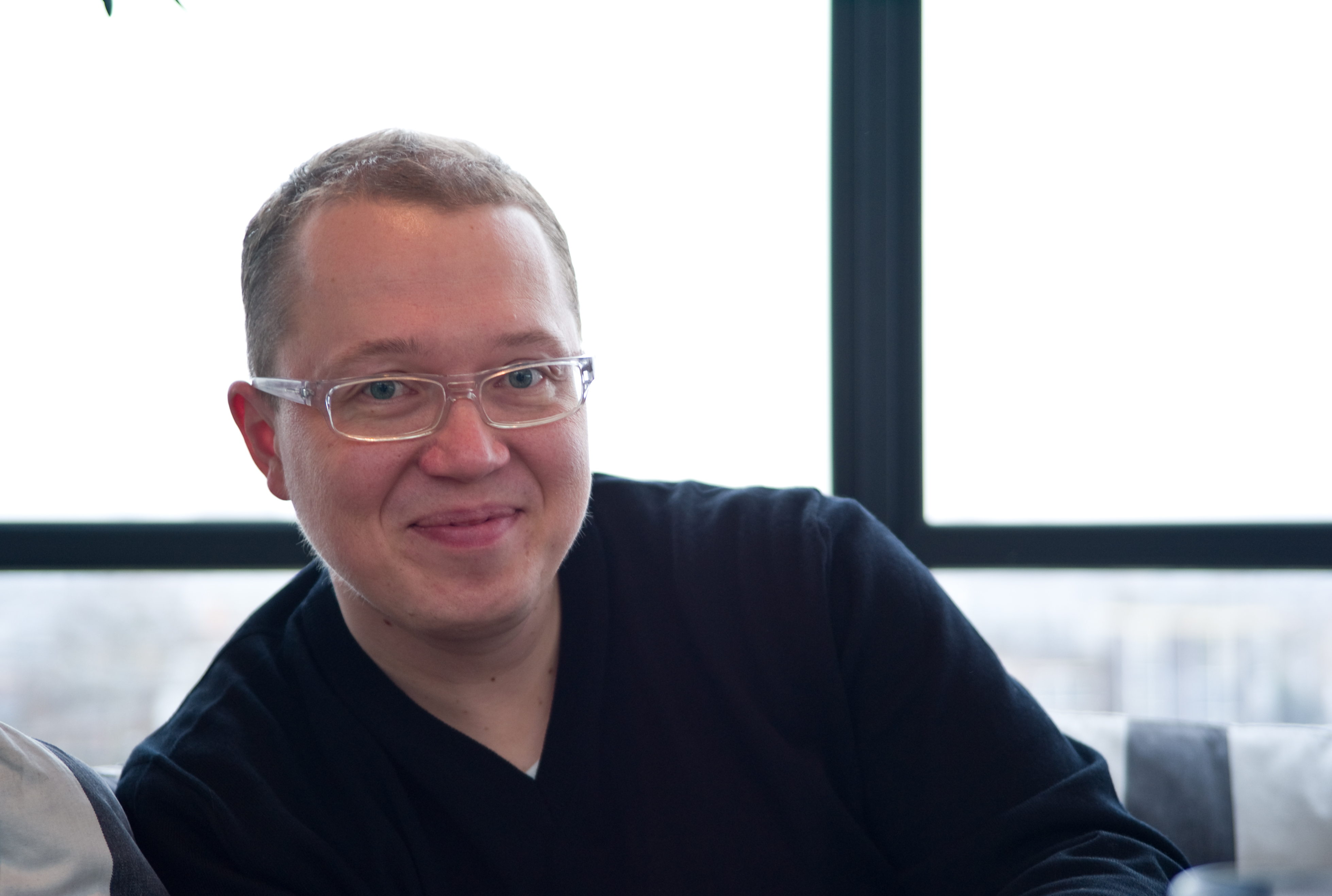 Marko Ahtisaari